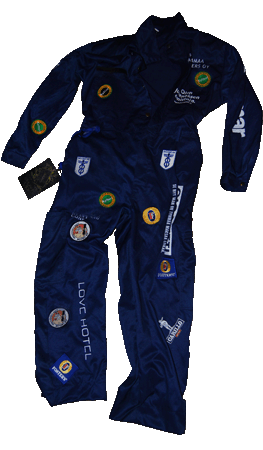 Boomin haalarit